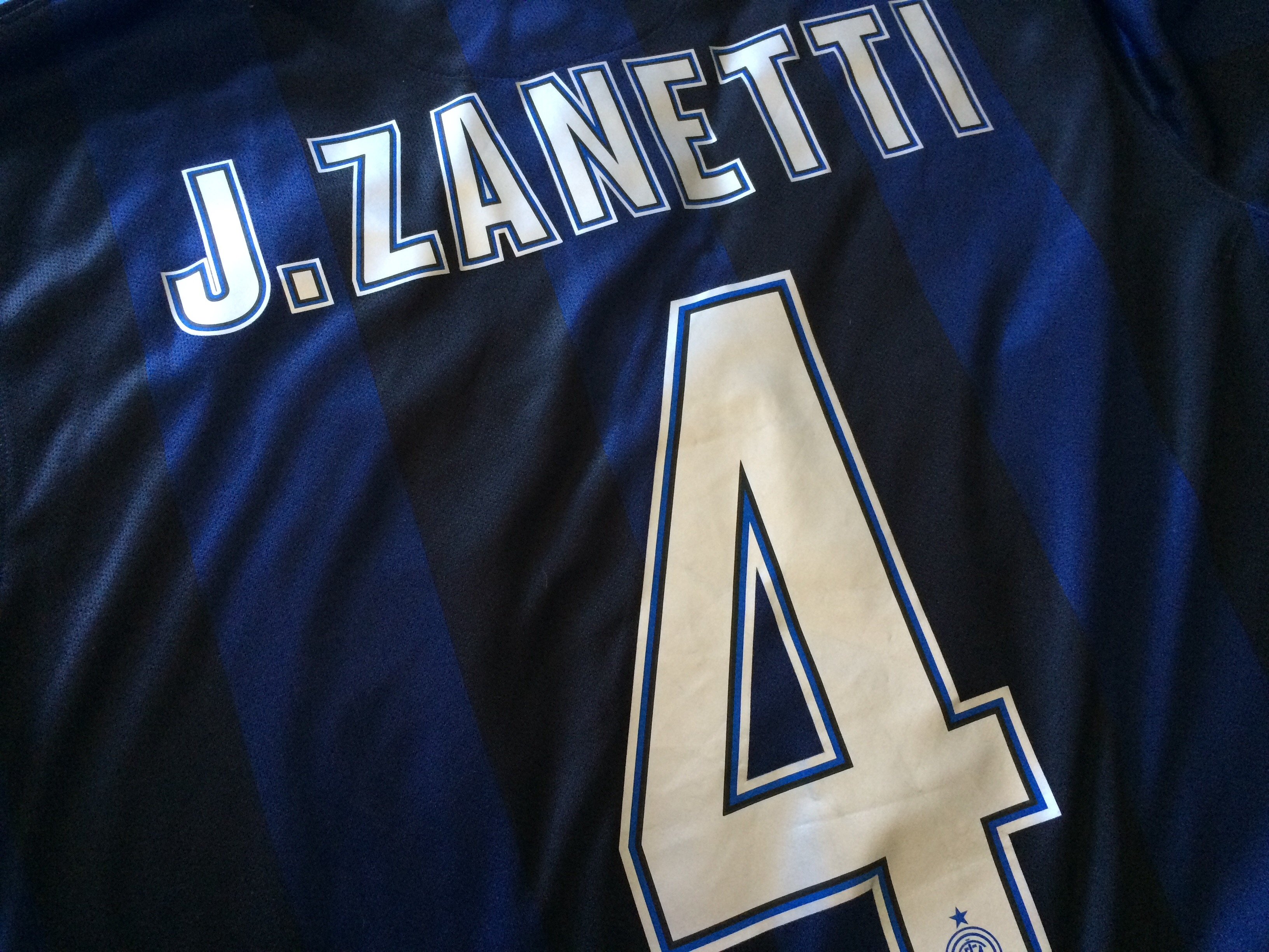 Ultima maglia indossata da Javier Zanetti, quella della stagione 2013-2014